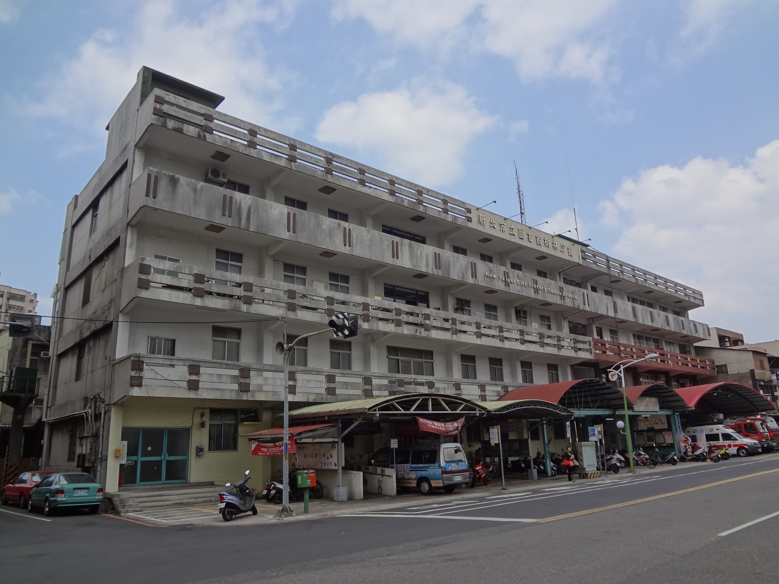 新北市立圖書館樹林分館，位於臺灣新北市樹林區中山路二段80號3、4樓。